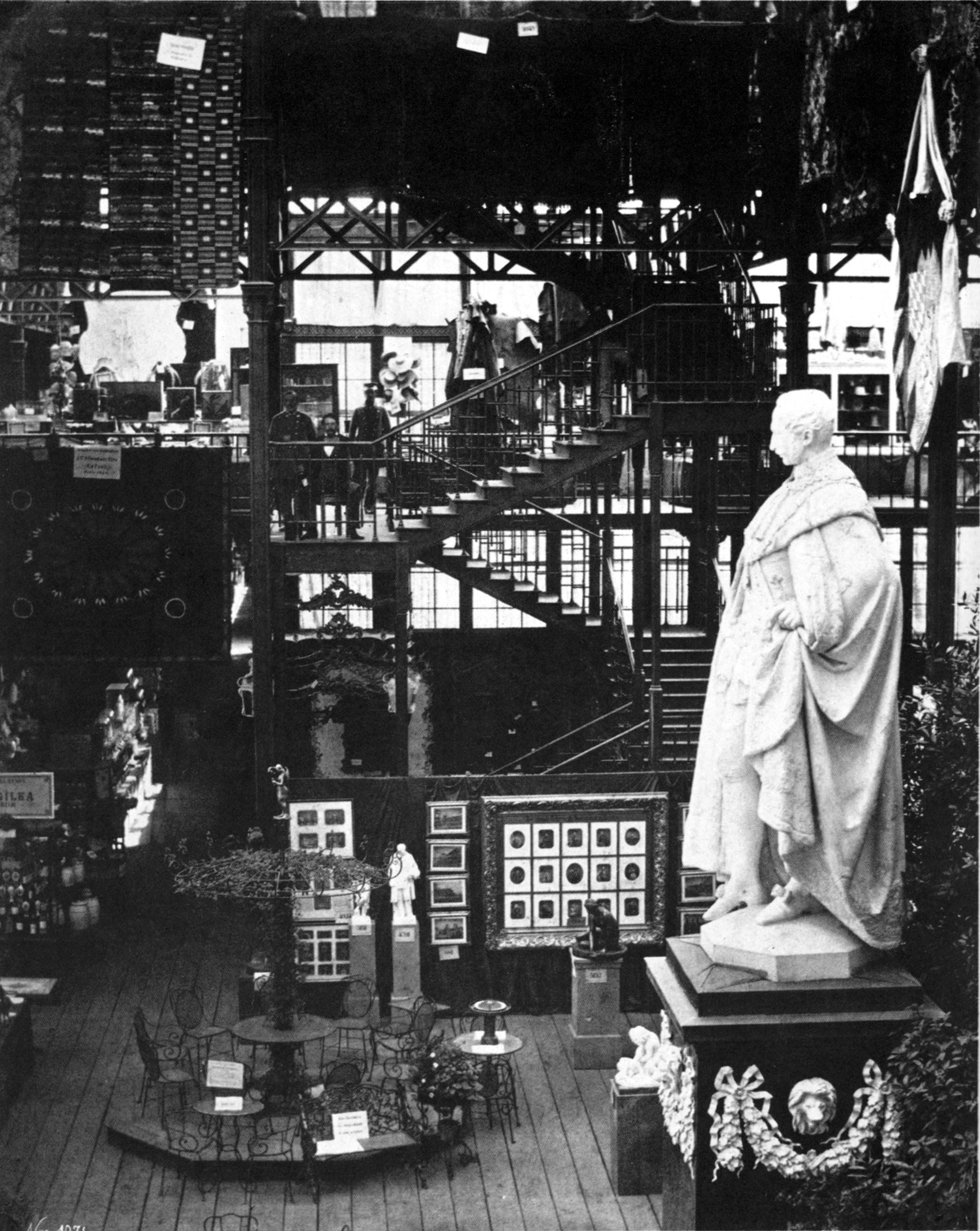 Glaspalast mit Deutscher Industrieausstellung, im Vordergrund stellt Hanfstaengl selbst seine Bilder aus.